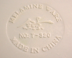 Штамп "Меламин" на пластмассовой посуде